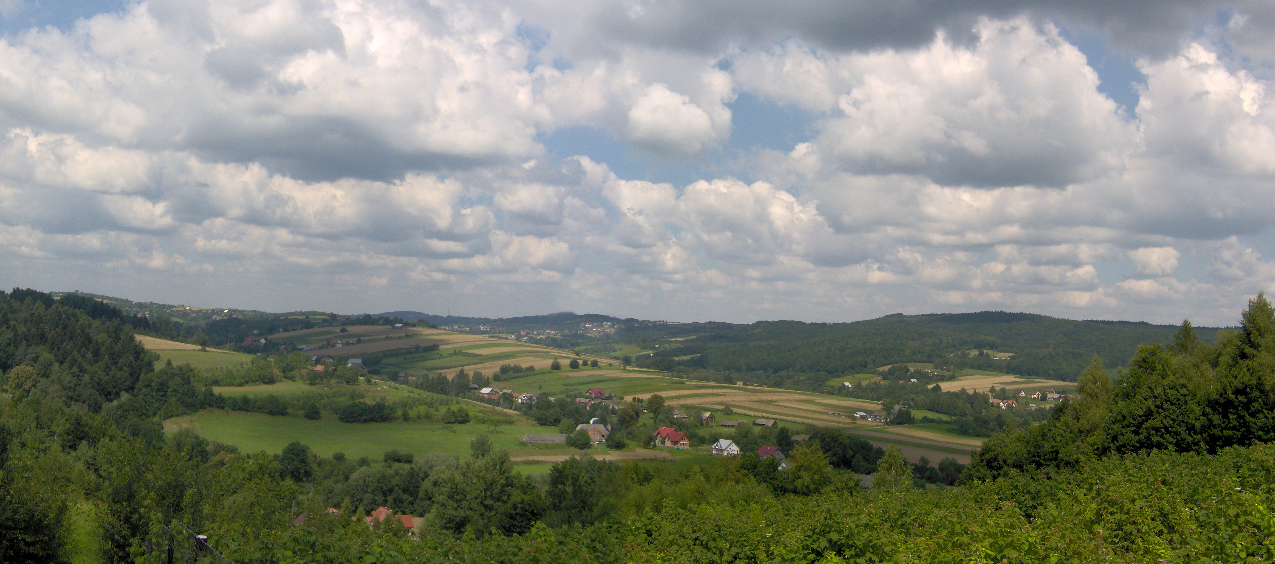 Gwoździec - widok ze zbocza wsi Zawada Lanckorońska